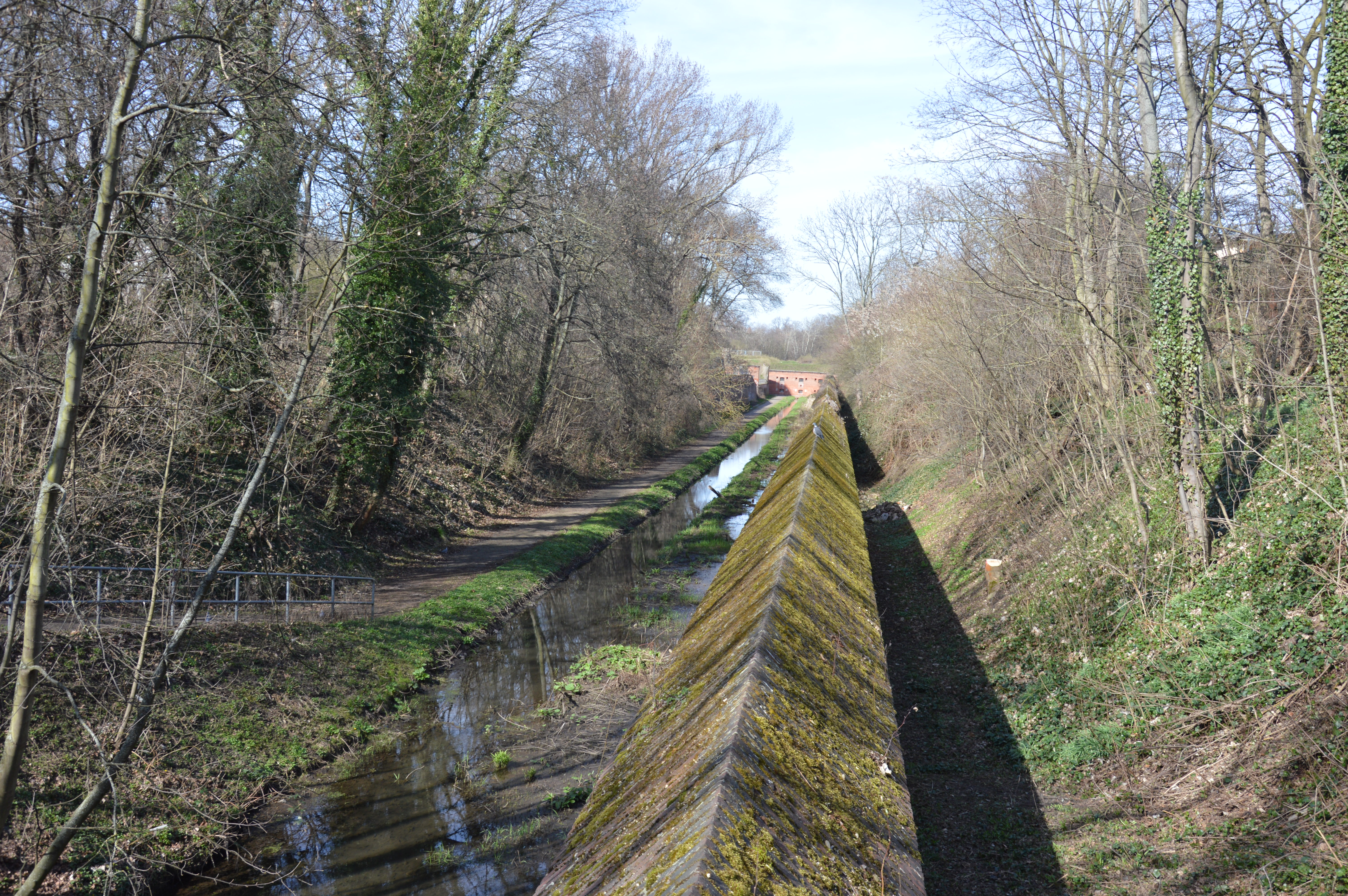 Festungsanlage Maybachstraße